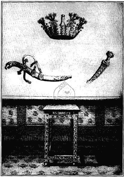 جواهرات تاجگذاری شاهان صفویان